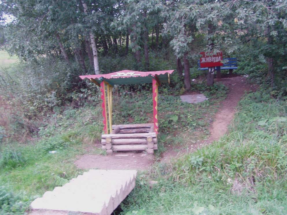 Источник недалеко от деревни Груздово, у дороги по направлению на Каськово